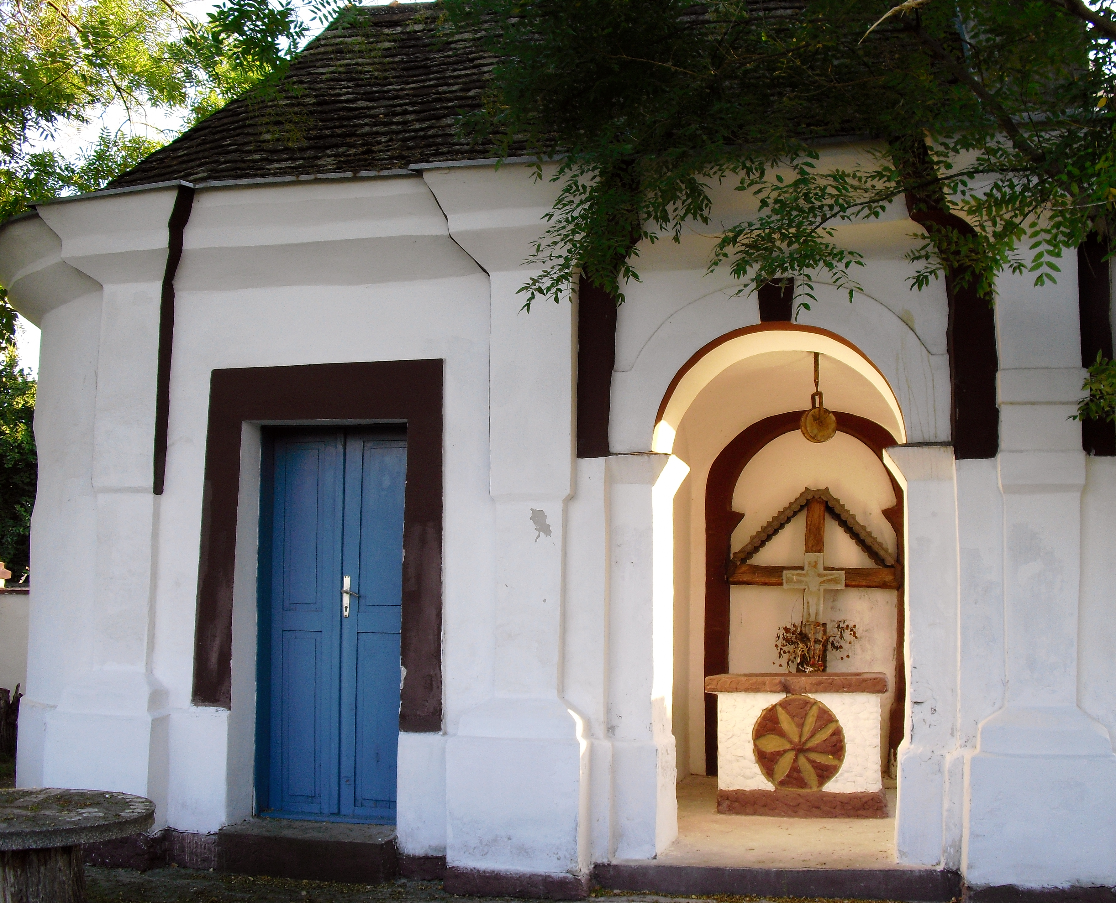 Капела "Водица" у Врбасу налази се на периферији града,поред пута за Бачко Добро Поље и Нови Сад...